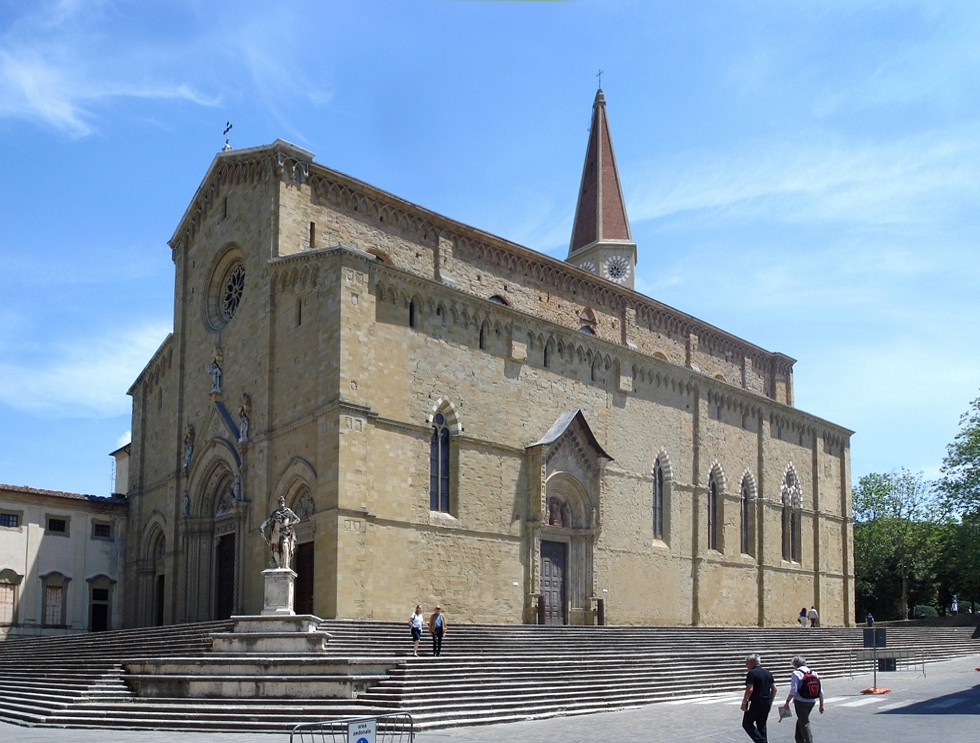 catedral de arezzo